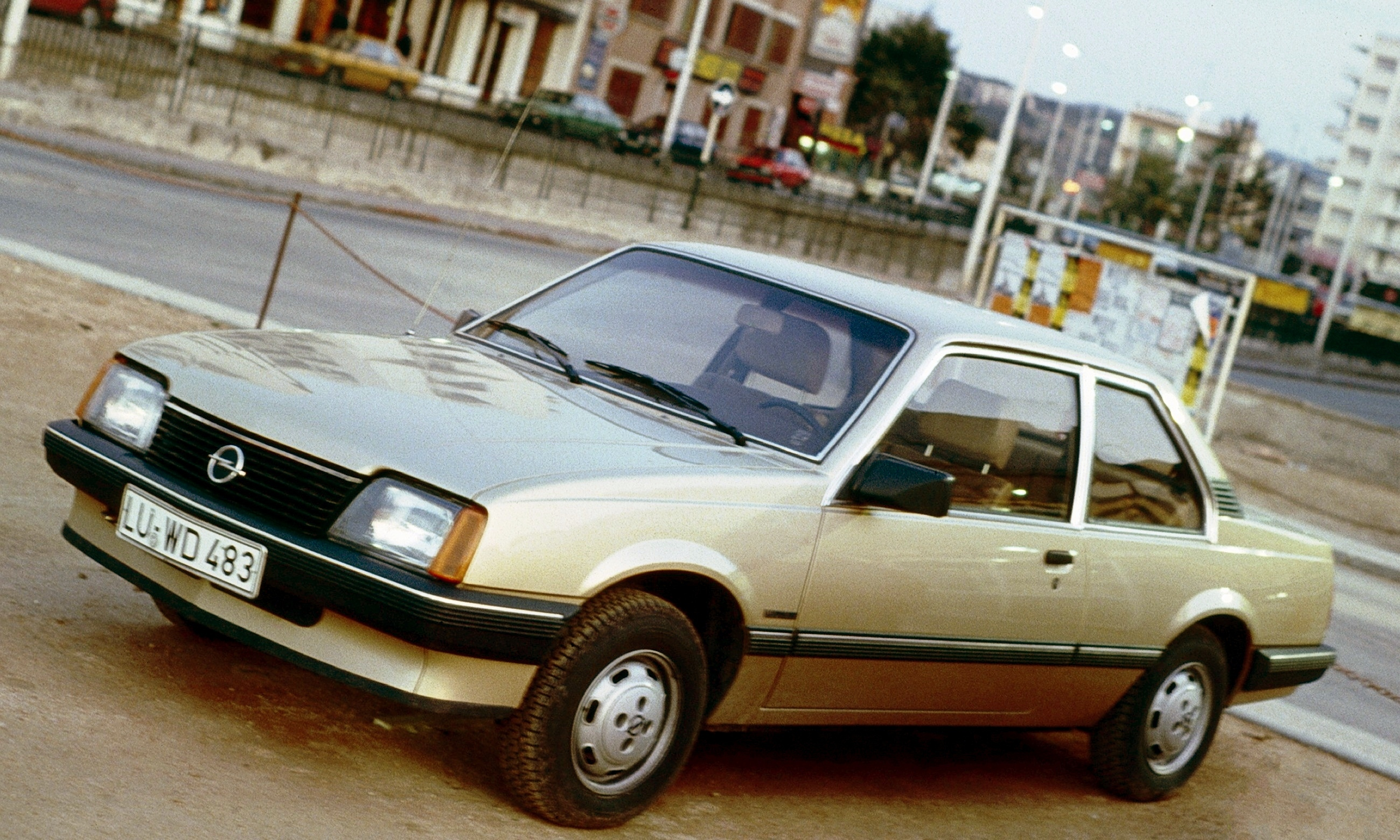 Opel Ascona C 2 door from Ludwigshafen